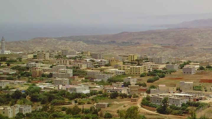 صورة لقرية إشنيوان